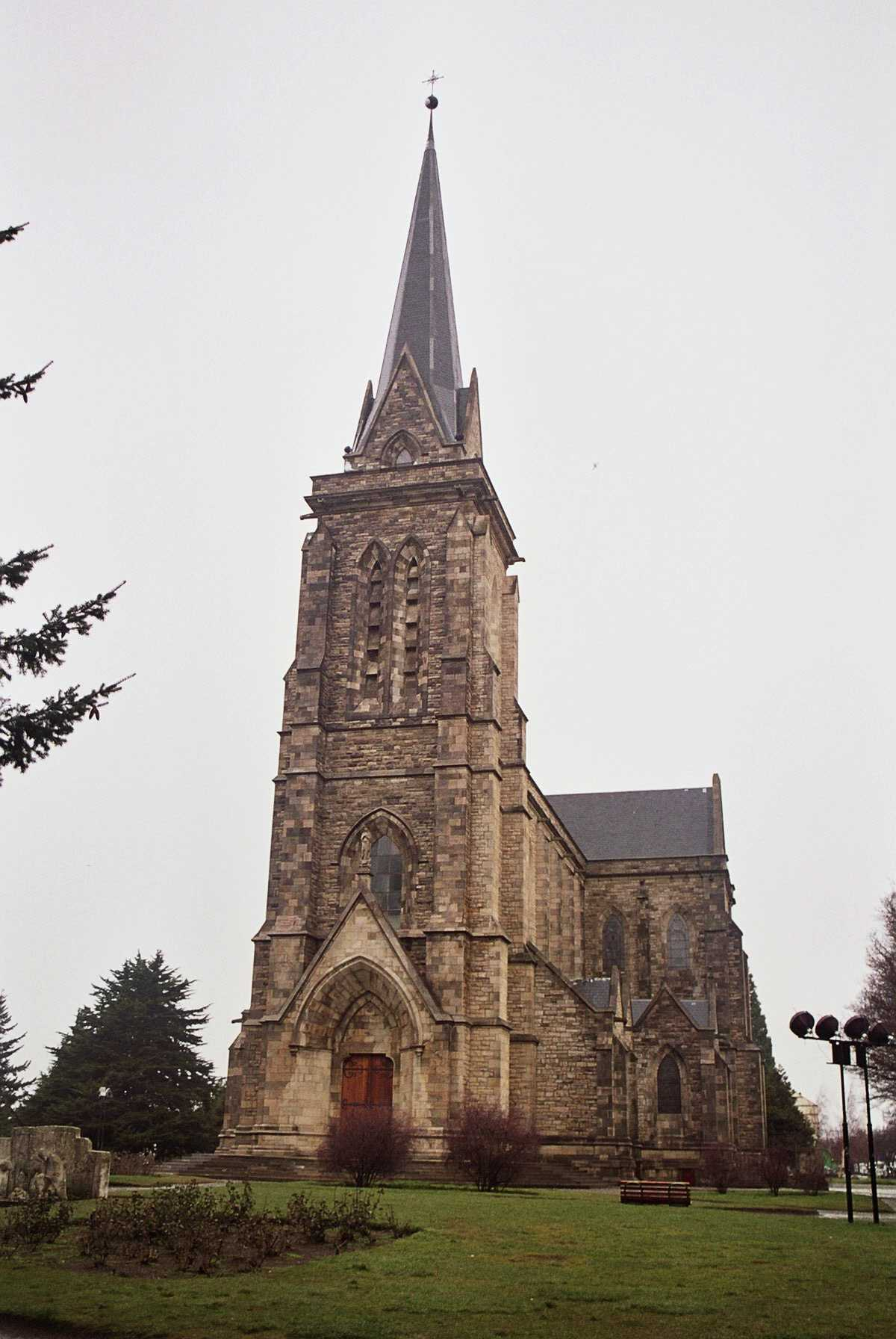 Catedral, San Carlos de Bariloche (Argentina)